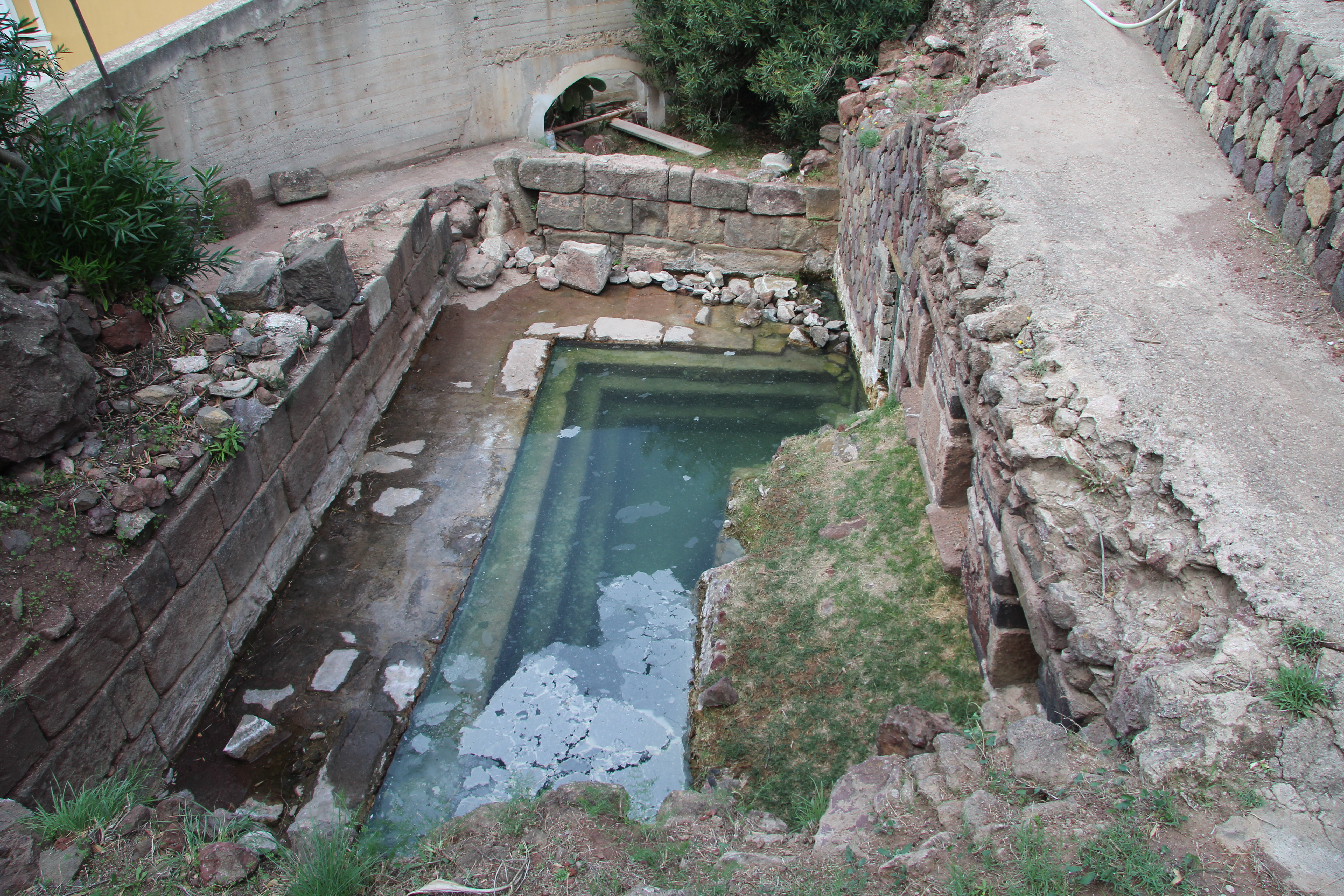 Die Thermen sind stillgelegt, wie man sieht